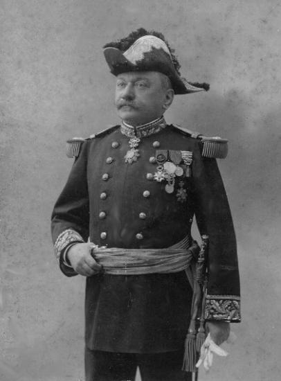 général Léon de Beylié (1849-1910)